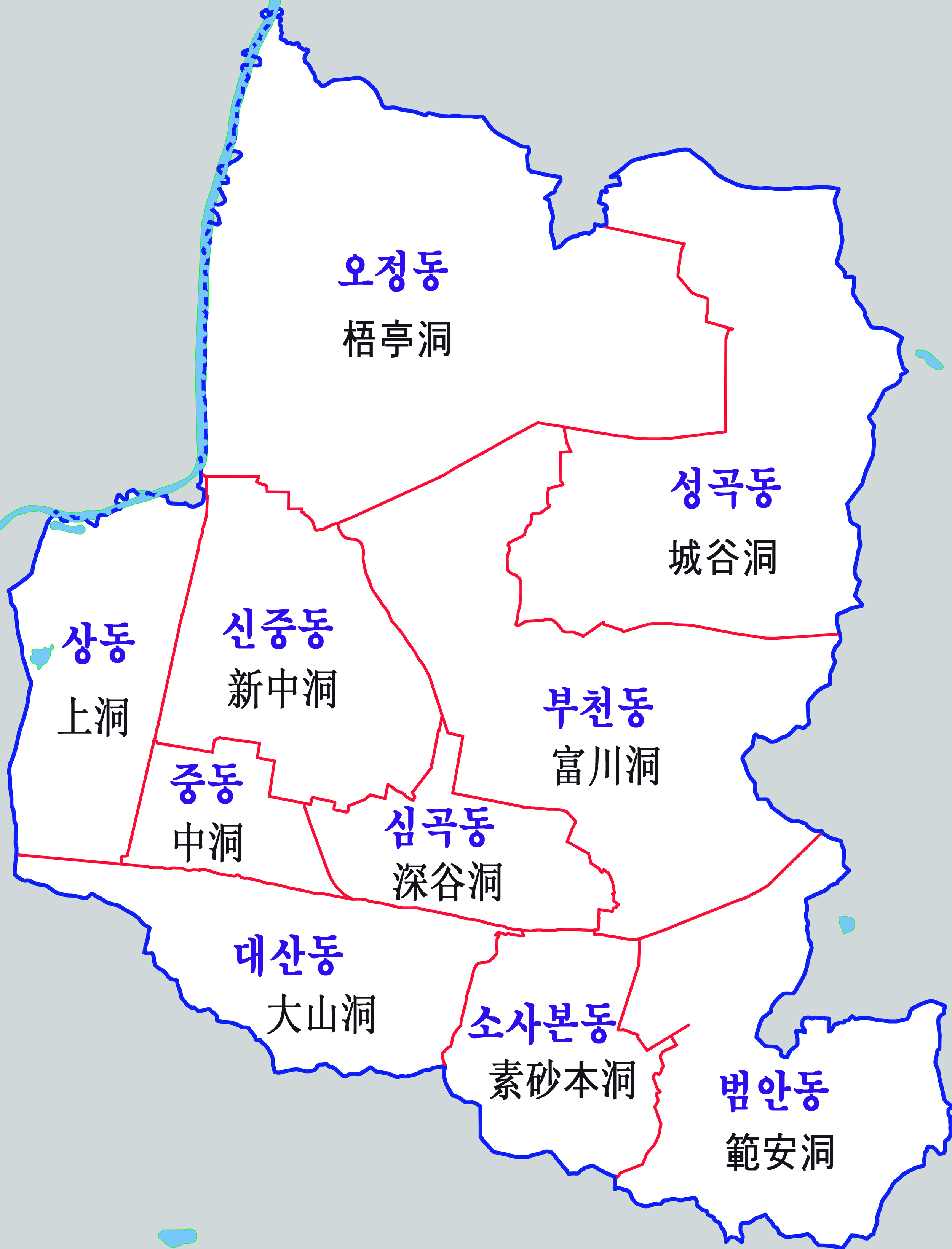 부천시 행정구역